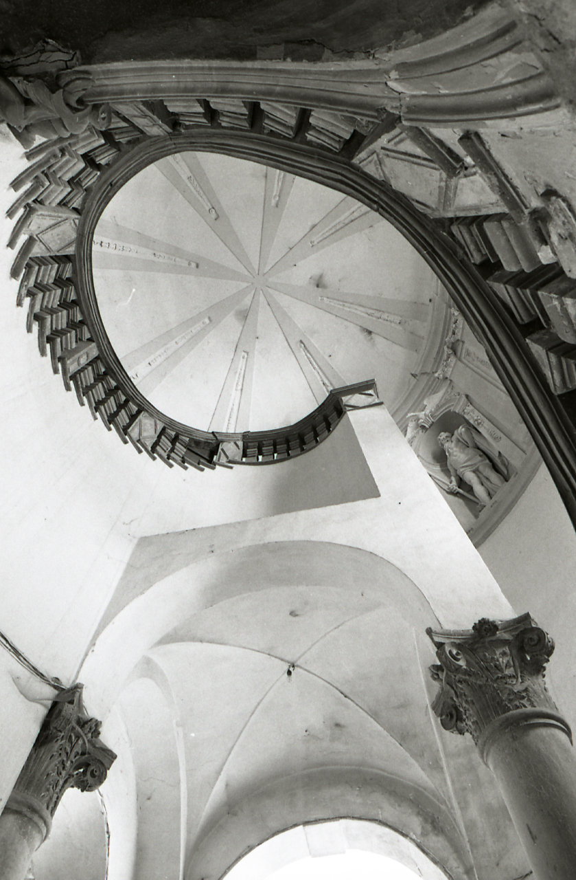 Servizio fotografico : Ferrara, 1981 / Paolo Monti. - Strisce: 3, Fotogrammi complessivi: 14 : Negativo b/n, gelatina bromuro d'argento/ pellicola ; 35 mm. - ((Sul portanegativi: N[I]K[MA]T FP4 e iscrizione: "Scala Palazzo Sacrati 1-14". - La serie è identificata da Monti con segni grafici e distinta dalla successiva. - Occasione: Documentazione (interni ed esterni di chiese e palazzi ferraresi - scala del Palazzo Sacrati (secondo l'ordine del Professor Andrea Emiliani) -. - Fonte: Agenda di Paolo Monti: Nikon Leika 3001-/ Monti 1978 (1978-1982), presso Archivio Paolo Monti. - Fonte: Fattura di Paolo Monti: IV. Commesse/ Fattura n. 30/ Fotografie interni ed esterni di chiese e palazzi ferraresi (1981/10/07), presso Archivio Paolo Monti. N. 15 riprese scala del Palazzo Sacrati